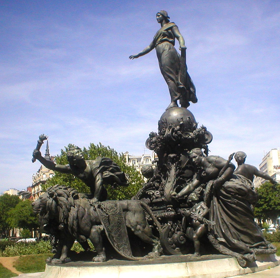 Le Triomphe de la République (1899) - Place de la Nation (Paris) Aimé-Jules Dalou Prise de vue personnelle (Juin 2006) Siren-Com 17:07, 9 June 2006 (UTC)